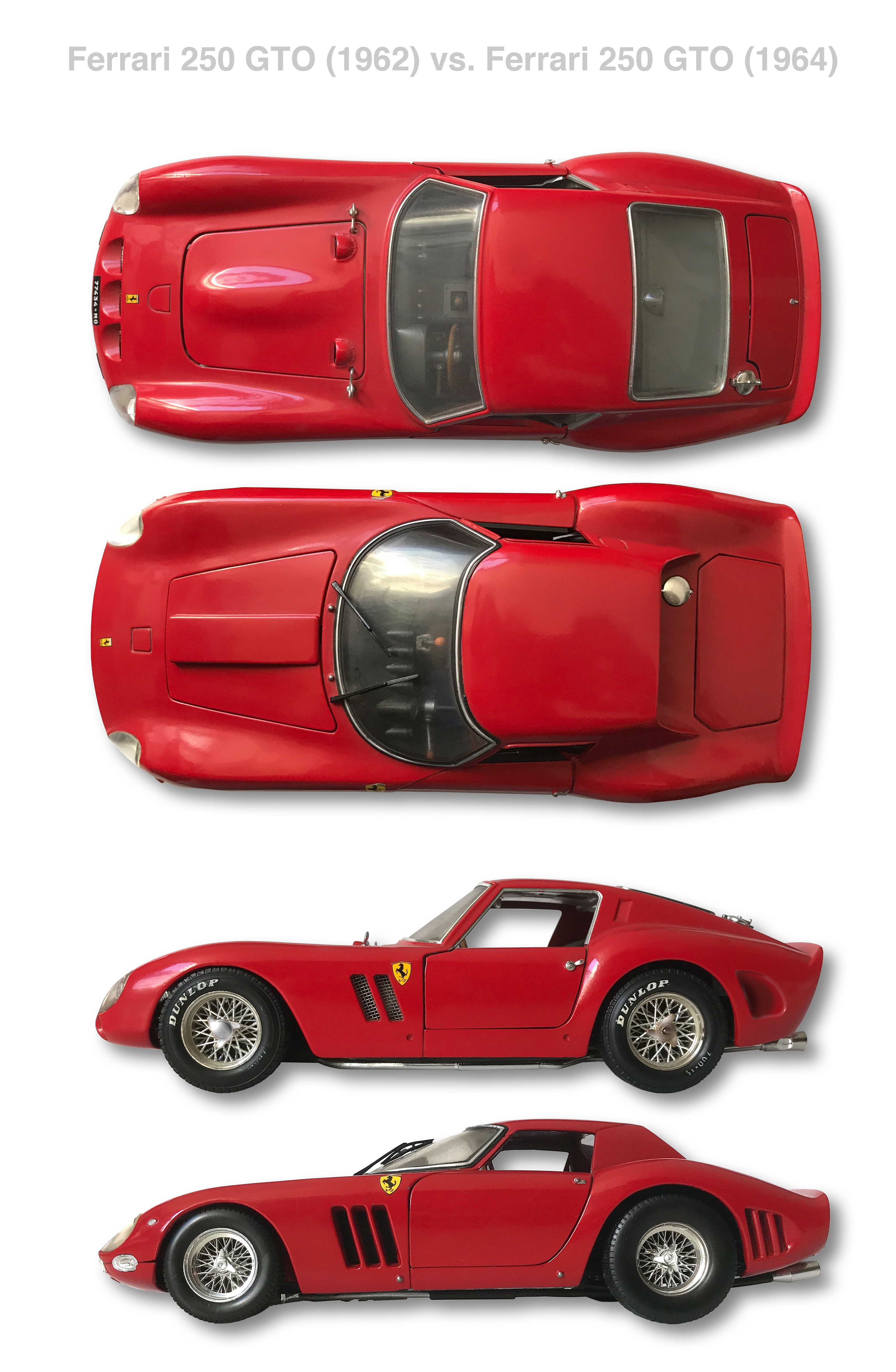 Unterschiede der Karosserieformen des Ferrari 250 GTO